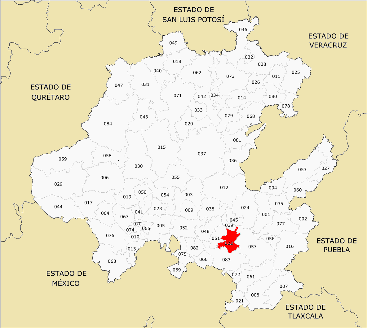 Municipios de Hidalgo